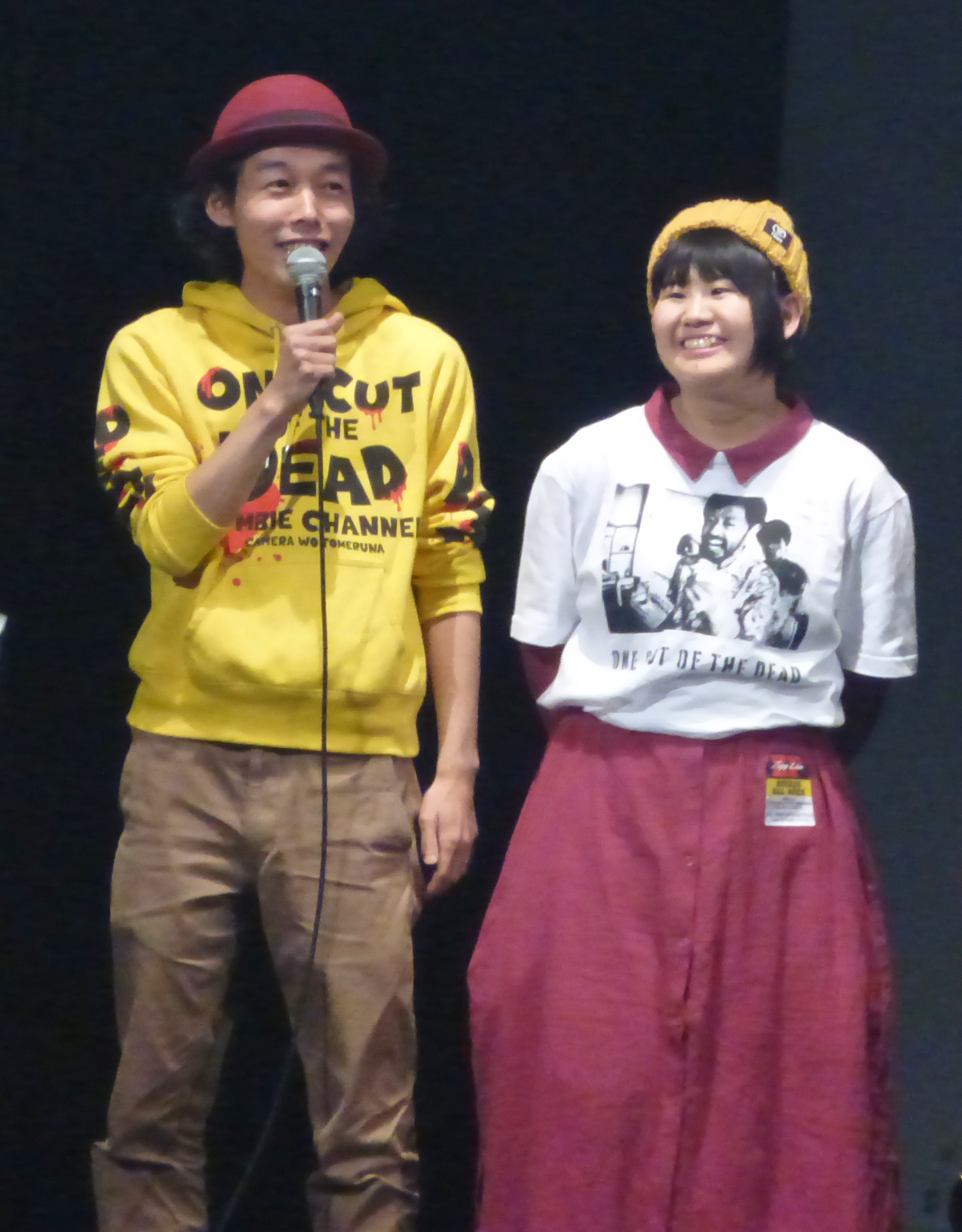 上田慎一郎・ふくだみゆき夫妻（2018年11月22日、Zeppダイバーシティ東京「最高かよ〜！『カメ止め！』アツアツ感染者集会〜ポンデミック2018〜」）